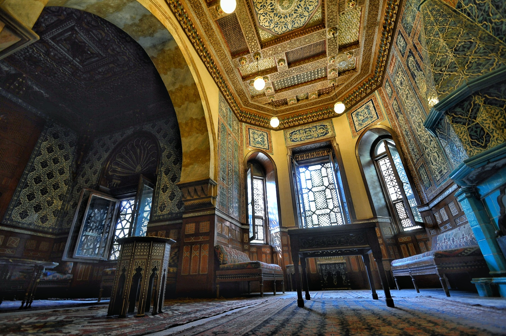 Interiér muzea Al-Majnál, Egypt